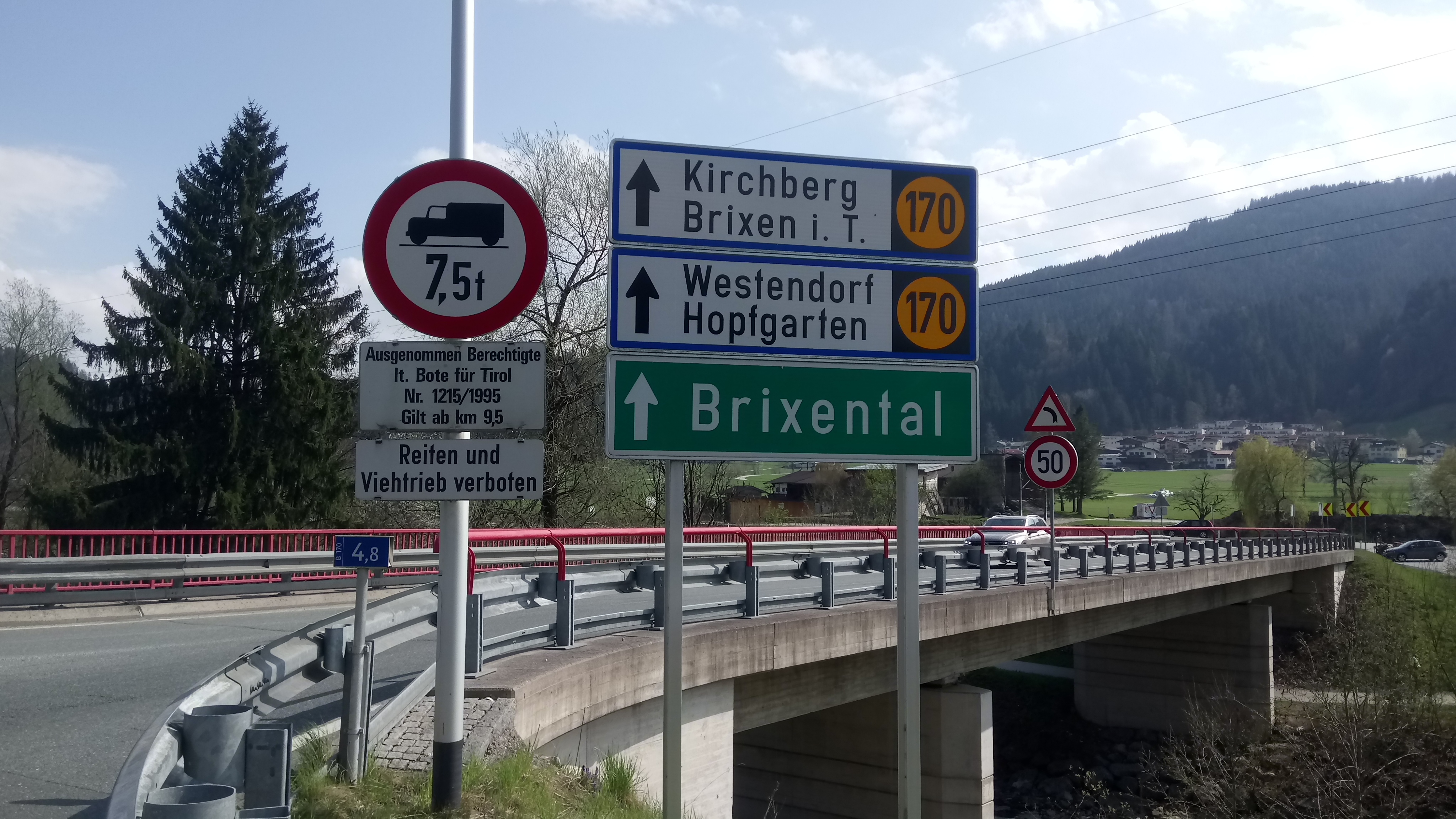 B170, neuer Beginn bei km 4,8